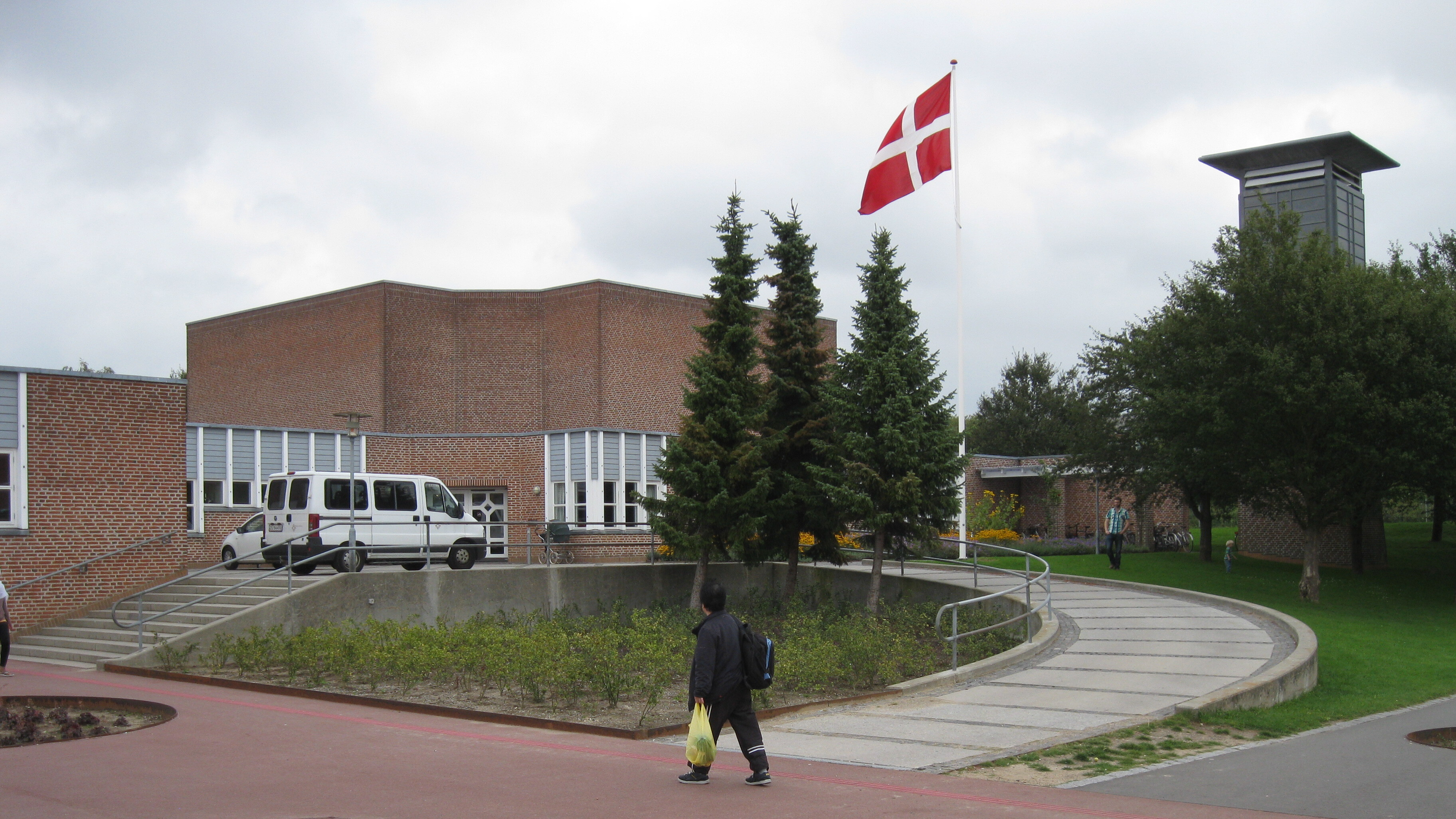 Helligåndskirken, Århus